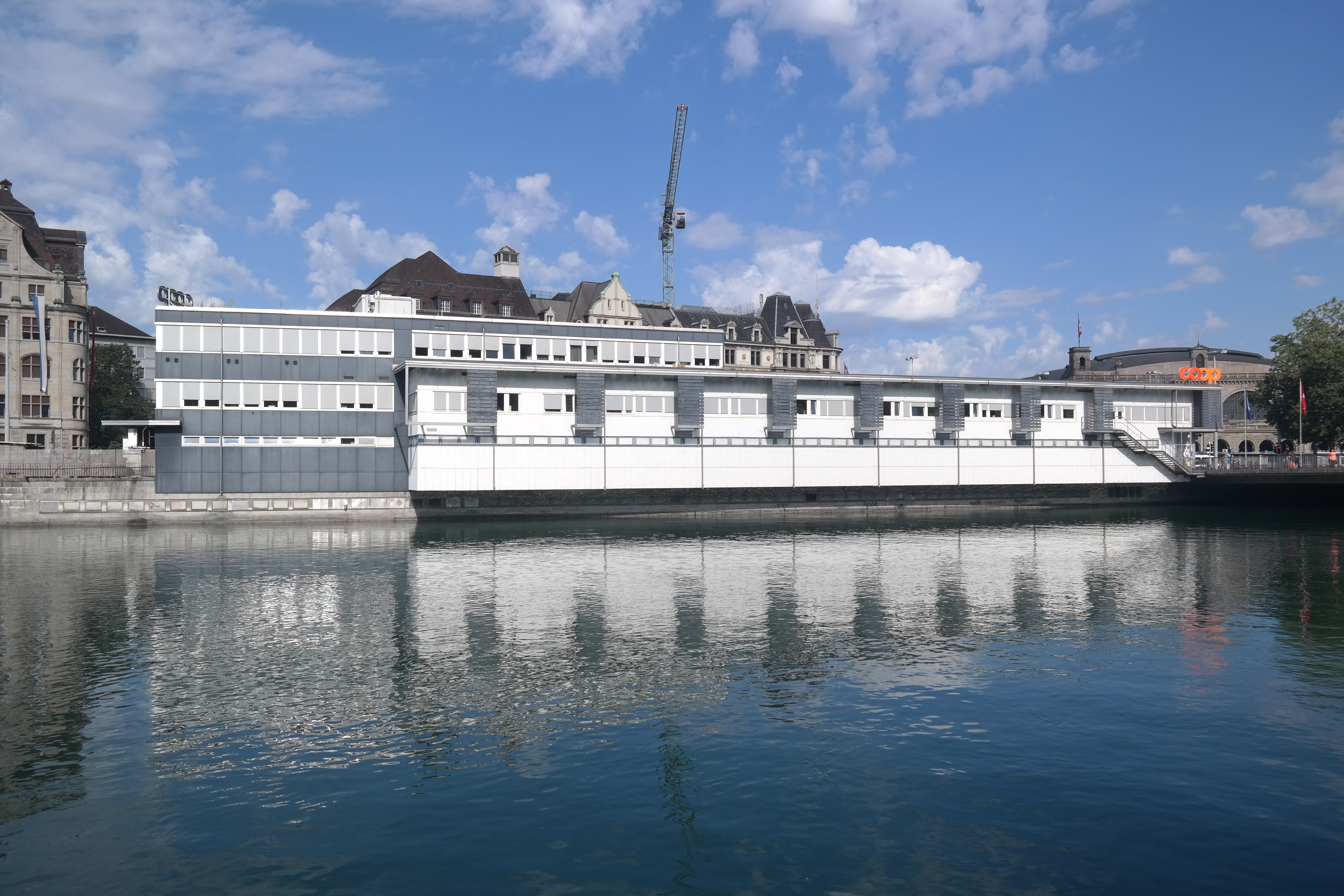 Ehemaliges Globus-Provisorium, das 1968 zu einem autonomen Jugendzentrum umgewidmet werden sollte, was aber in einer geschichtsträchtigen politischen Demonstration, bekannt als die Zürcher Globuskrawalle endete. Heute ist in dem ursprünglich provisorisch gedachten Gebäude das "Coop-Provisorium" am Bahnhofquai in Zürich.